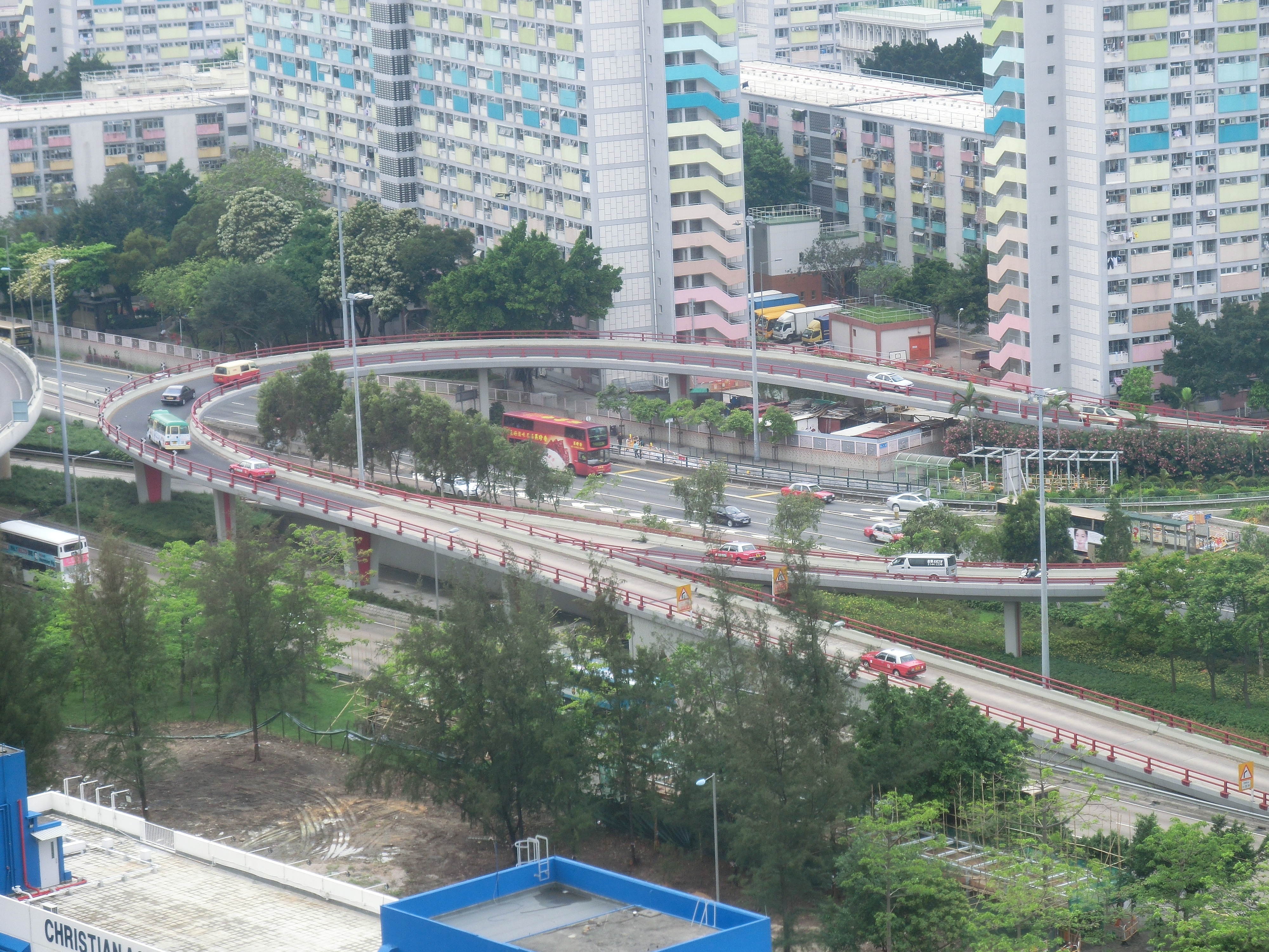 中文（香港）: 彩虹交匯處。